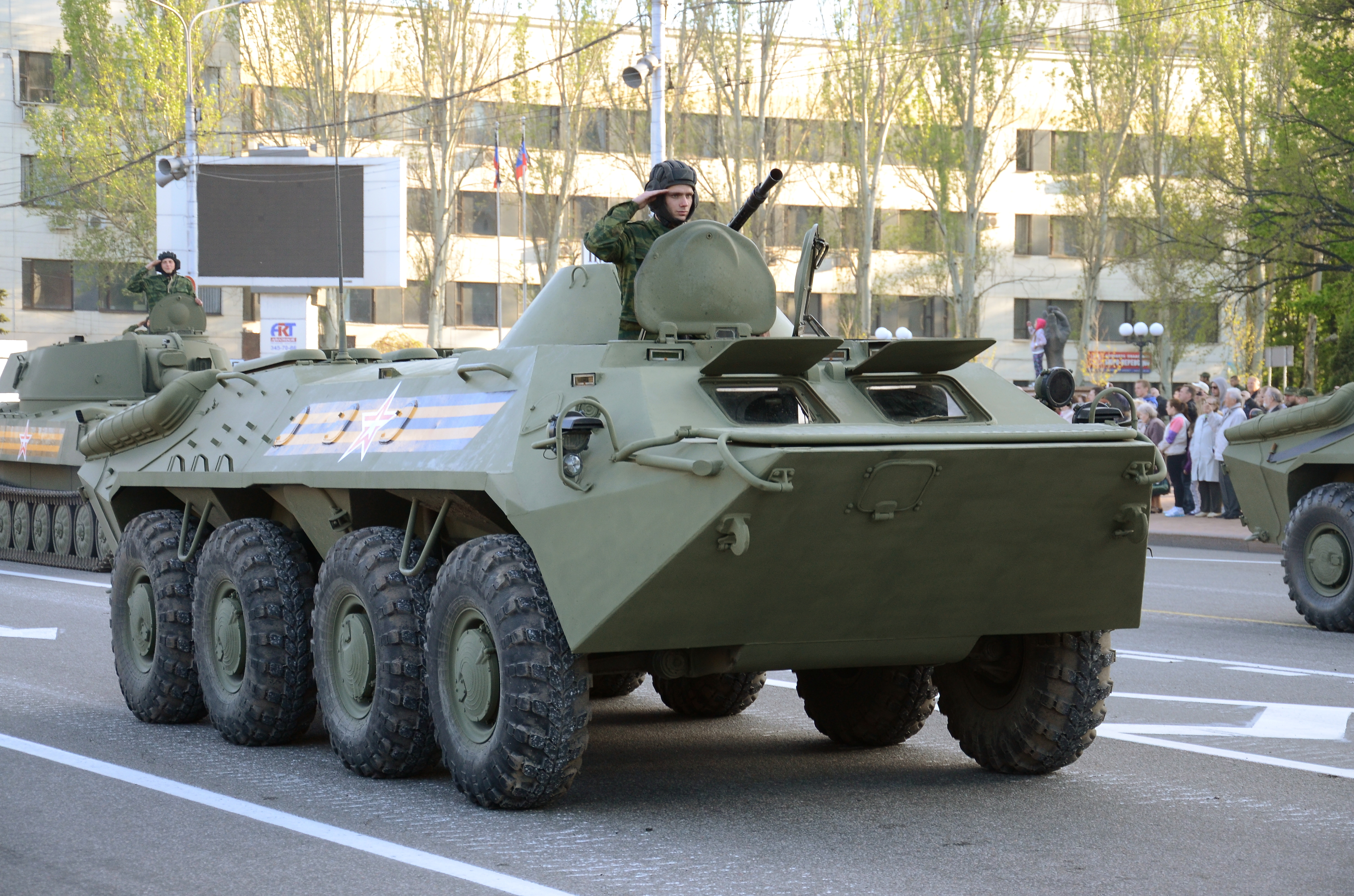 Репетиция парада в честь дня Победы в Донецке